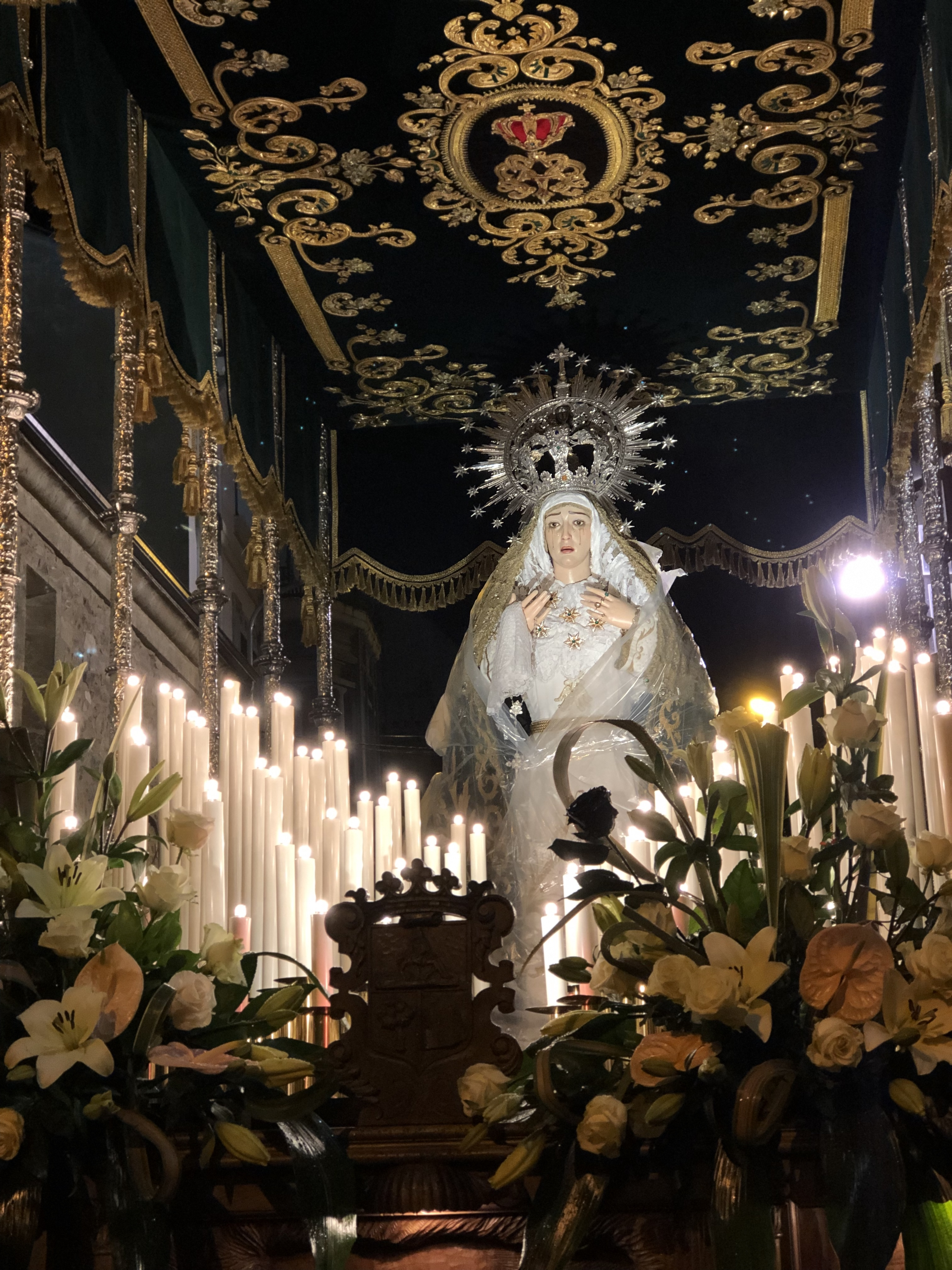 Virgen de la Amargura de la cofradía de Nuestro Padre Jesús Nazareno de La Bañeza en su trono en la procesión del Miércoles Santo.